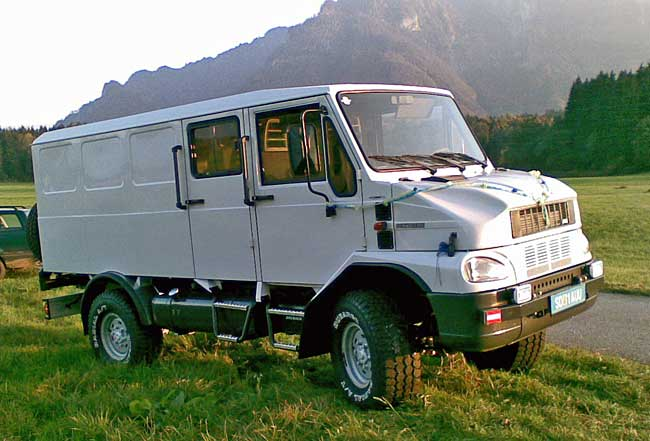 Bremach Job Extreme Kastenwagen (3,5-6 to)